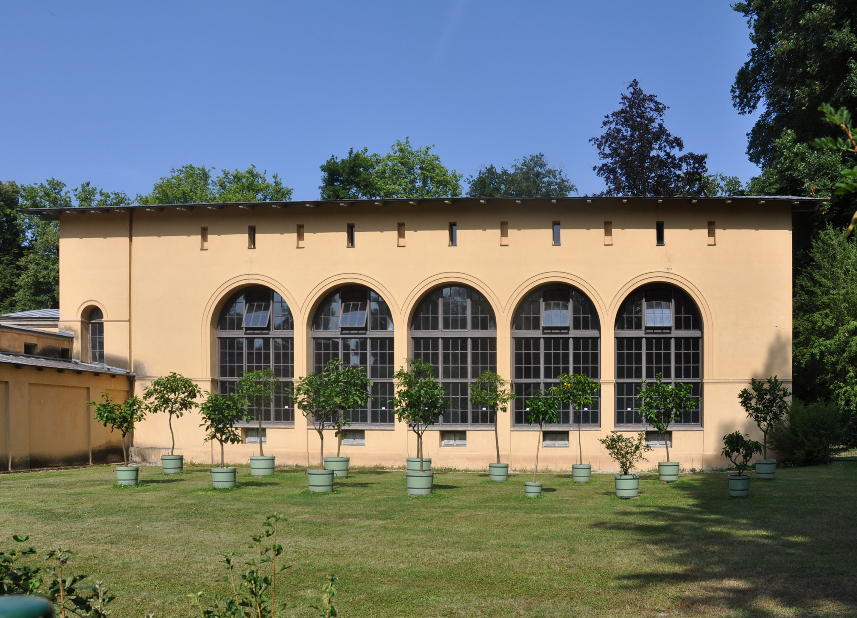 Das Orangenhaus von Osten